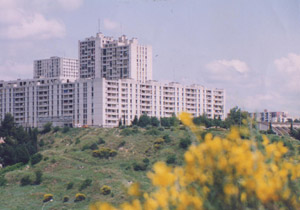 La ZUP Nord de Nîmes, appellée Valdegour. Vue depuis la rocade ouest Image perso